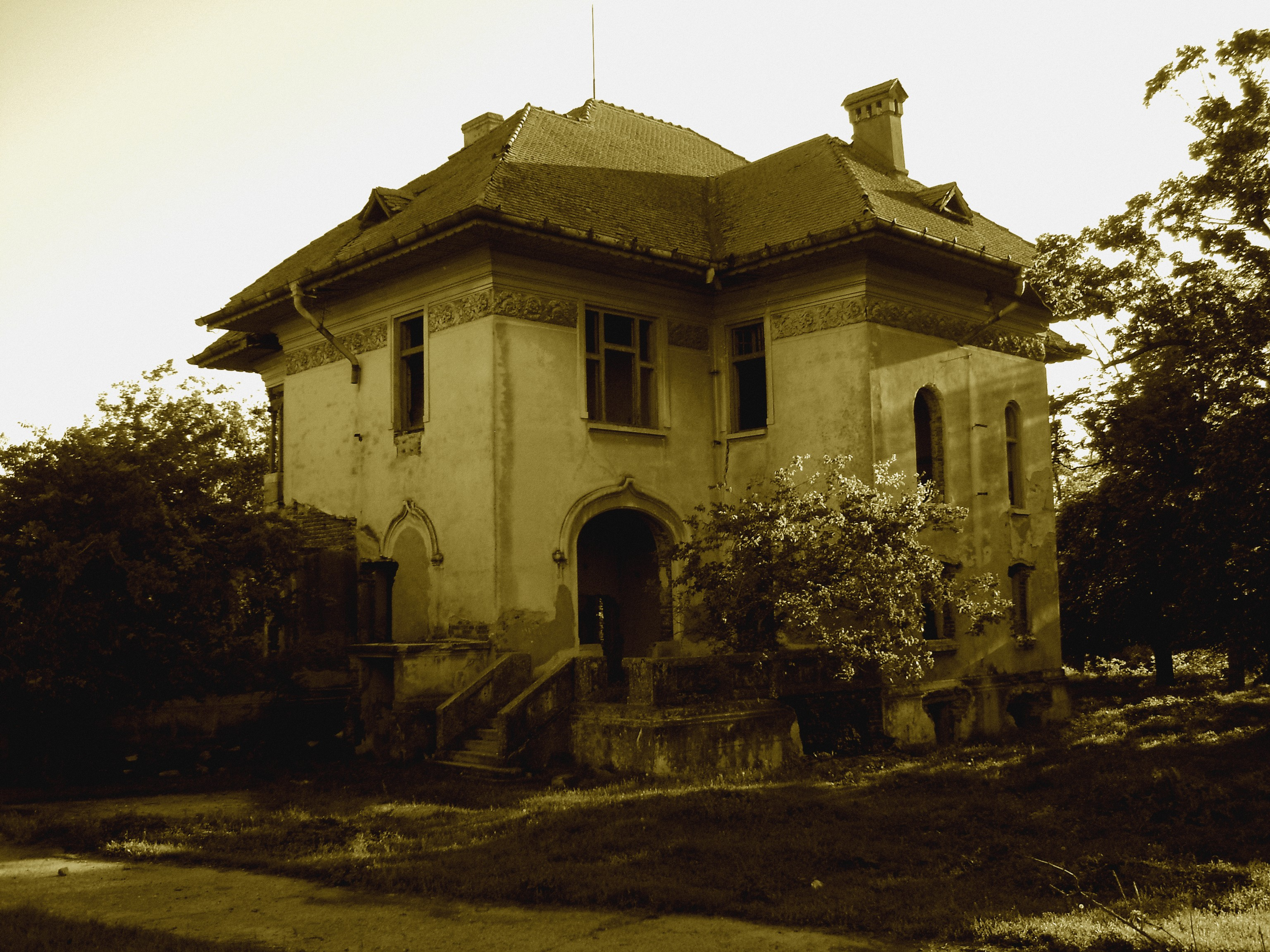 Conacul Brătășanu 01